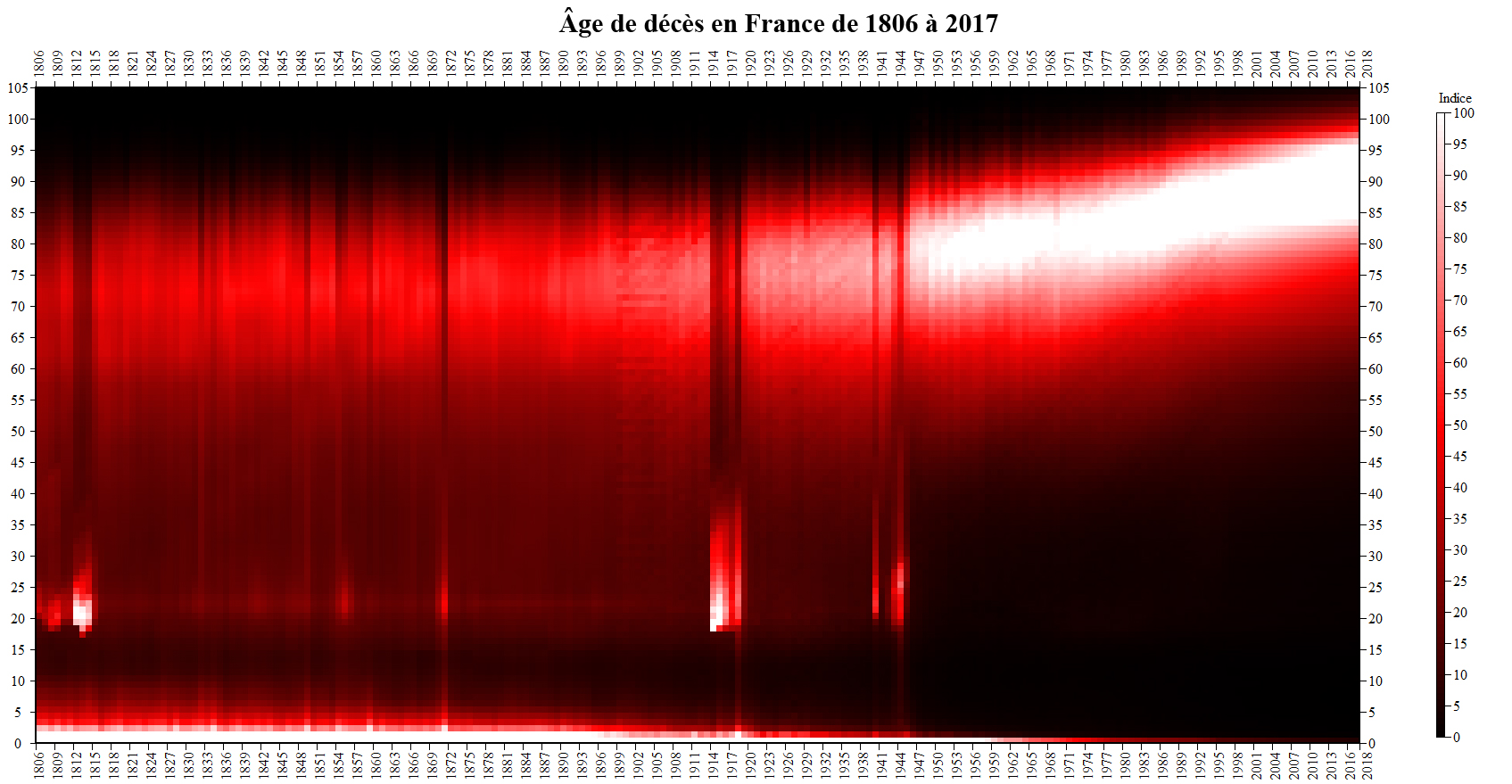 Évolution d'âge de décès en France de 1806 à 2017 (Source: INED) Indice proportionnel au pourcentage de décès (100 = 3 225 morts sur 100 000). Légende: Indice du pourcentage de morts d'une année en fonction de l'âge. Cette indice est indépendant de l'année, 100 indique un pourcentage de mort pour 100 000 morts, 50 indique la moitié de ce pourcentage. (ex: sur toute les années, le plus fort tôt de mortalité était en 1871 pour les moins d'un an, 22 657 morts sur 100 000; en 2017 pour les 89 ans, il y a 4 607 morts sur 10 000; en 1806 pour les 66 ans, il y a eu 1 174 morts; 100 = 3 225 morts sur 100 000, 1871 pour 0 an est au dessus de 100, 2017 pour 66 ans est au dessus de 100, les deux sont tronqué à l'indice 100, 1806 pour 66 ans est 36,4% de 3 225 morts) Blanc = 100 dans l'année en ordonnée pour l'âge en abscisse. Rouge = 50 dans l'année en ordonnée pour l'âge en abscisse. Noir = 0 dans l'année en ordonnée pour l'âge en abscisse.